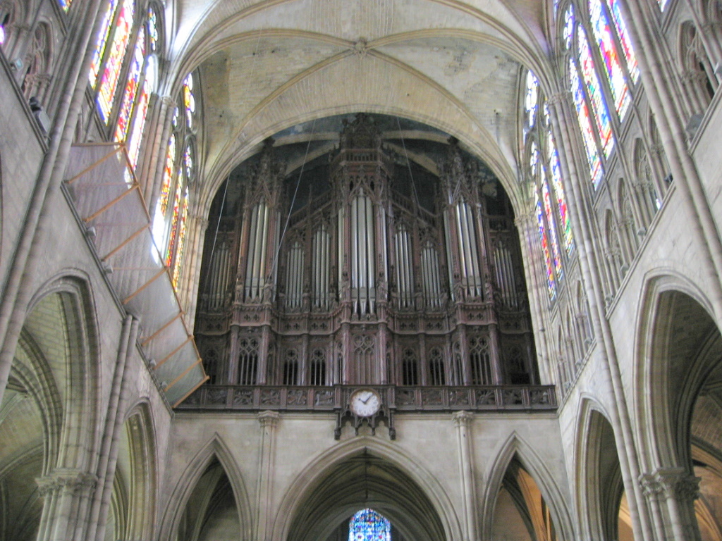 Basilique Saint-Denis de Saint-Denis au nord de Paris